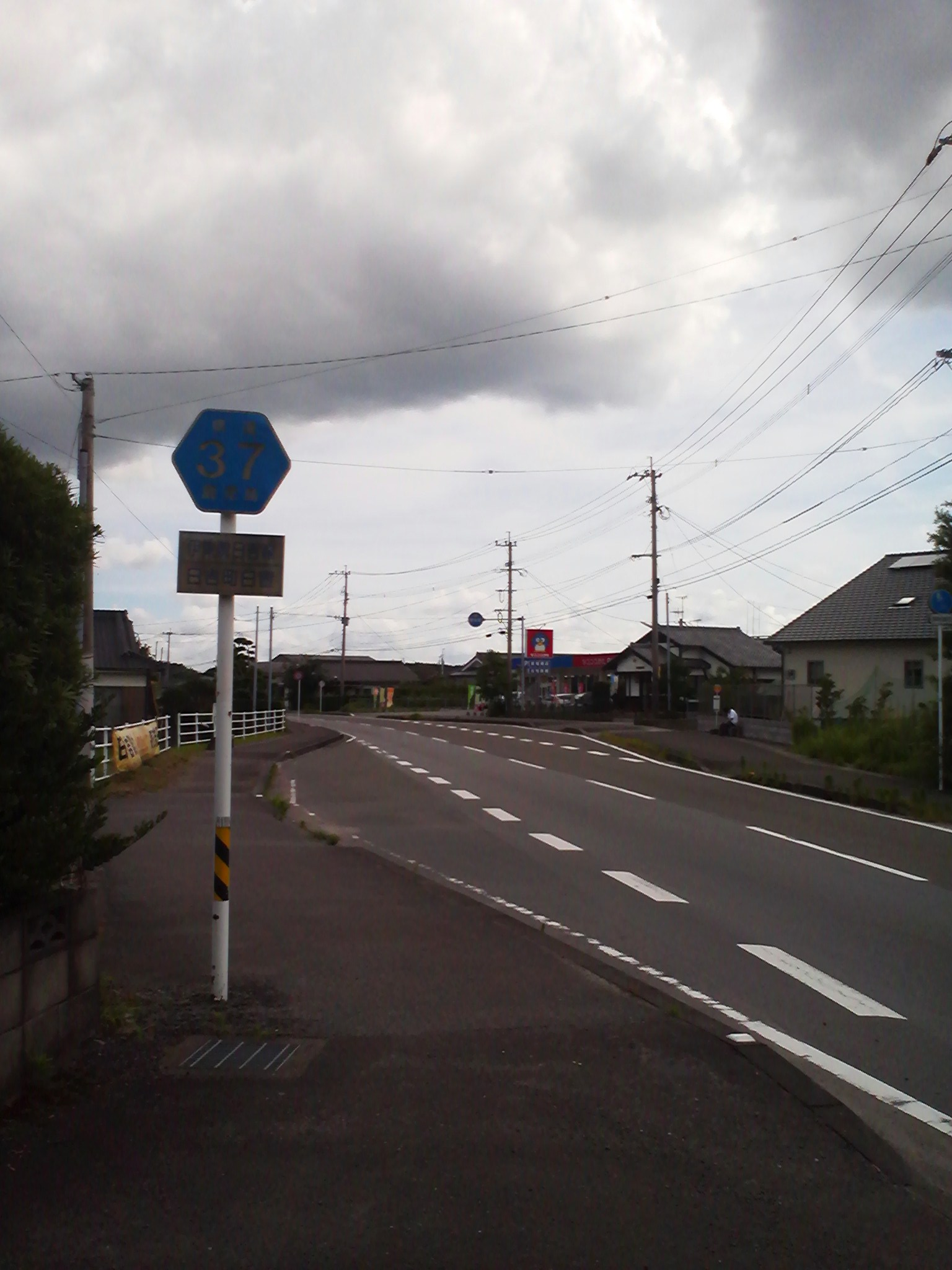 鹿児島県道37号伊集院日吉線（日吉町日置の日置郵便局付近から終点方向を望む）